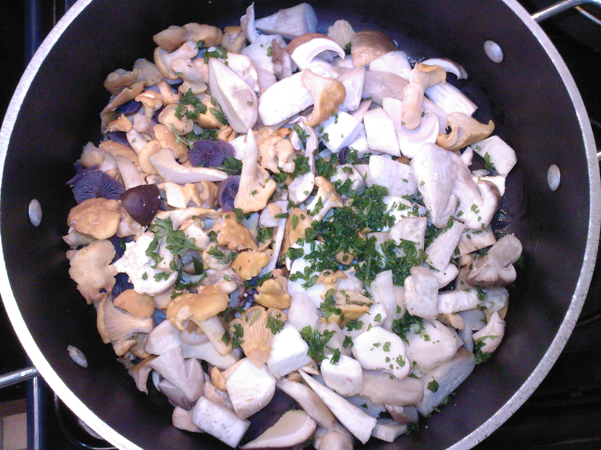 Poêlée de champignons, clitocybe améthyste, giroles et cèpes de Bordeaux